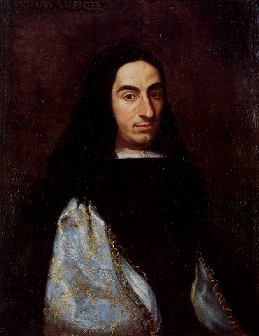 Retrato de Don Fernando de Valenzuela, Marqués de Villasierra